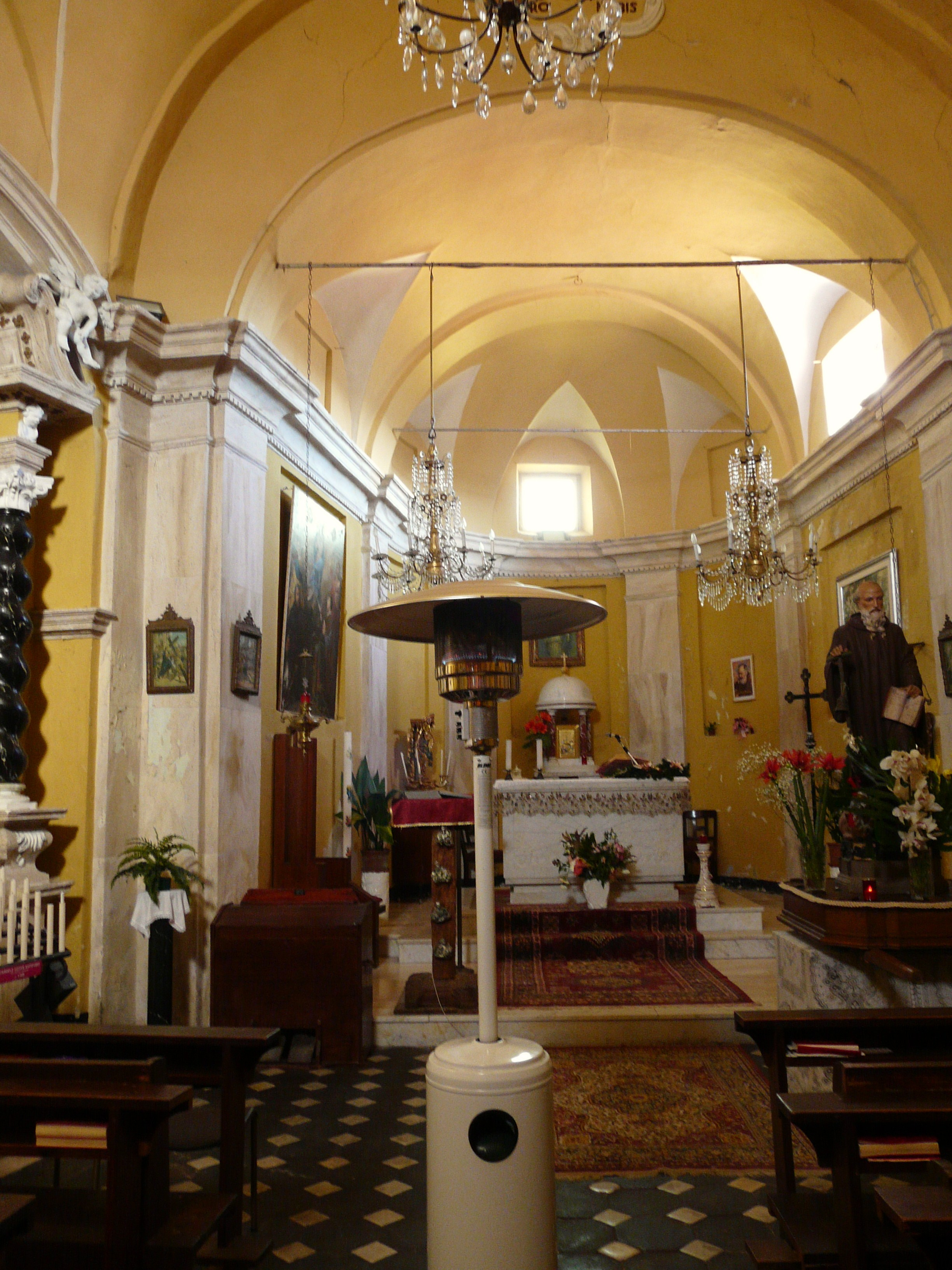 Chiesa di Sant'Antonio Abate a Bozzolo, Brugnato, Liguria, Italia